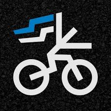 EJL